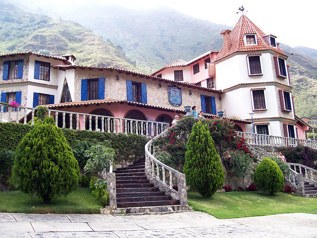 Castillo San Isidro - Vista Frontal